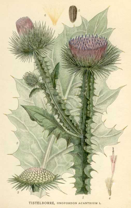 Tistelborre (Onopordon acanthium) 1 flowering branch 2 rosettblad sett från undersidan. 3 blomfästet efter frukternas avfallande 4 flower (1 1/2) 5 fruit (3/1) 6 hårpensel (3/1)